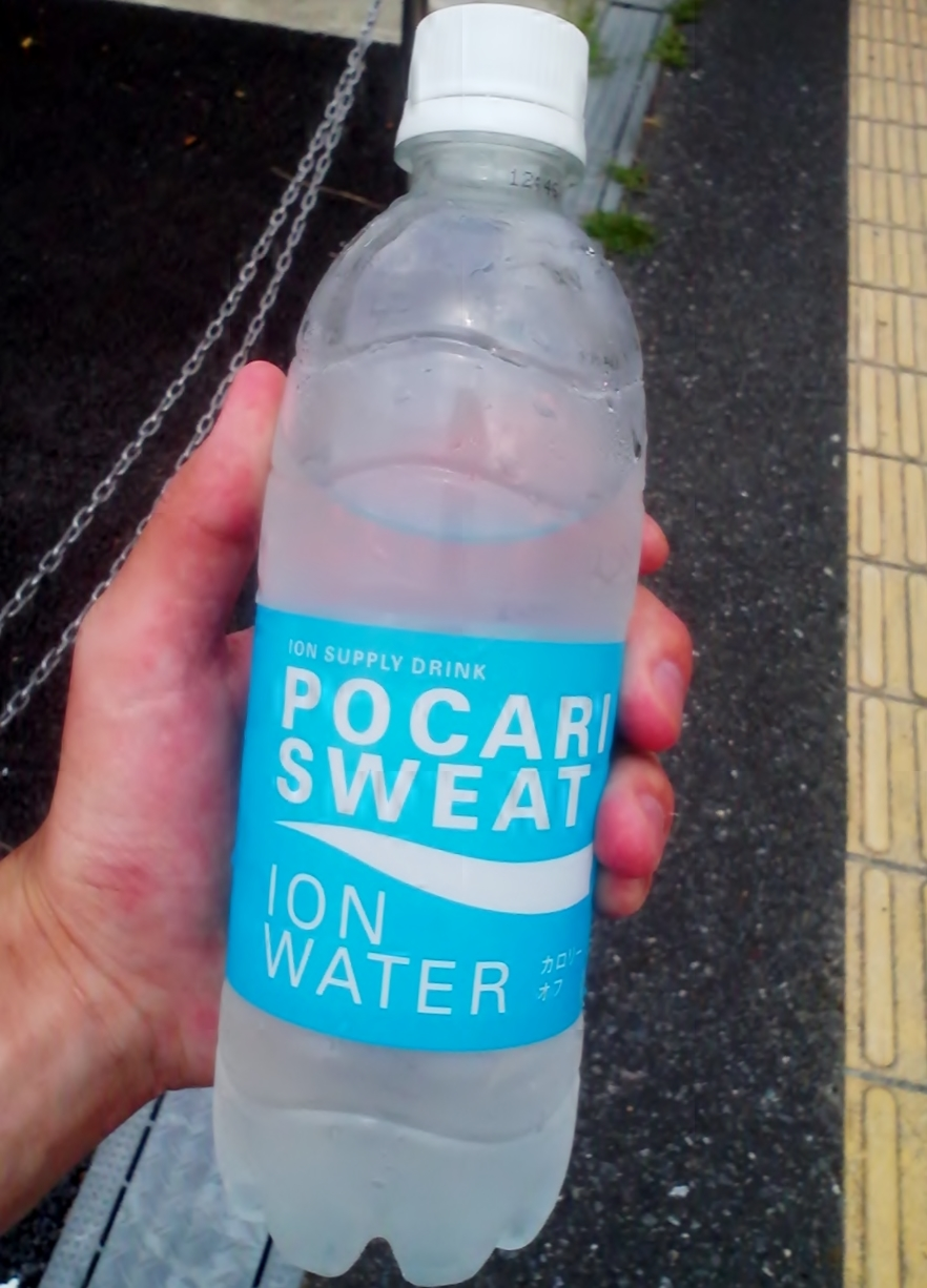 ポカリスエットイオンウォーター500mlペットボトルを撮影